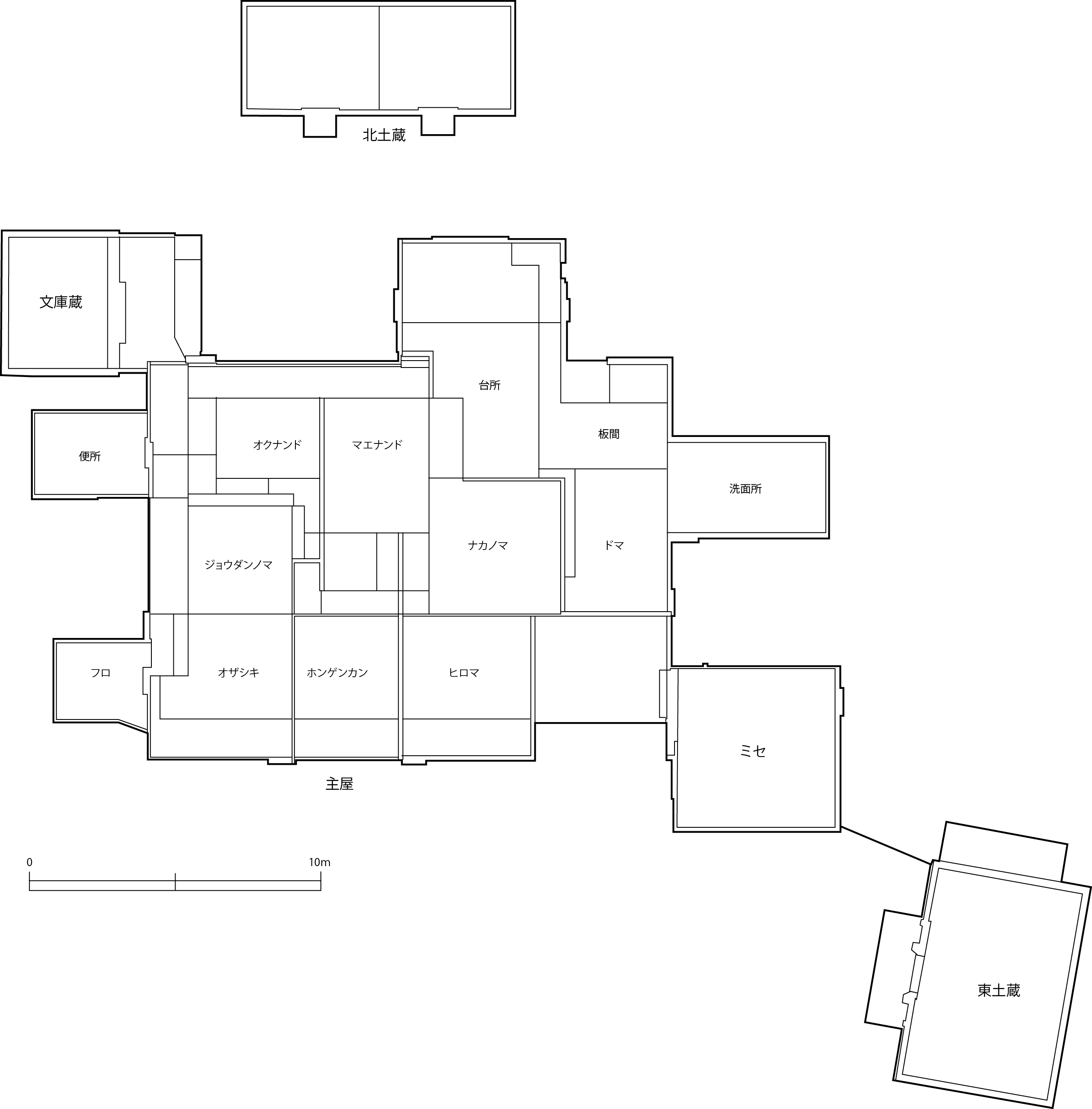 静岡県沼津市戸田にある重要文化財松城邸の一階部分平面図